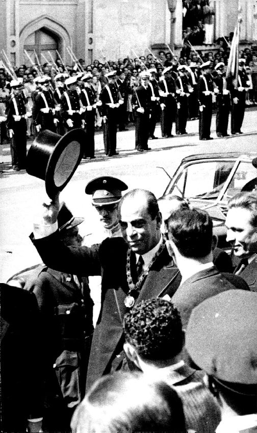 Rómulo Gallegos al salir del Capitolio Federal luego de su juramentación como Presidente de Venezuela.